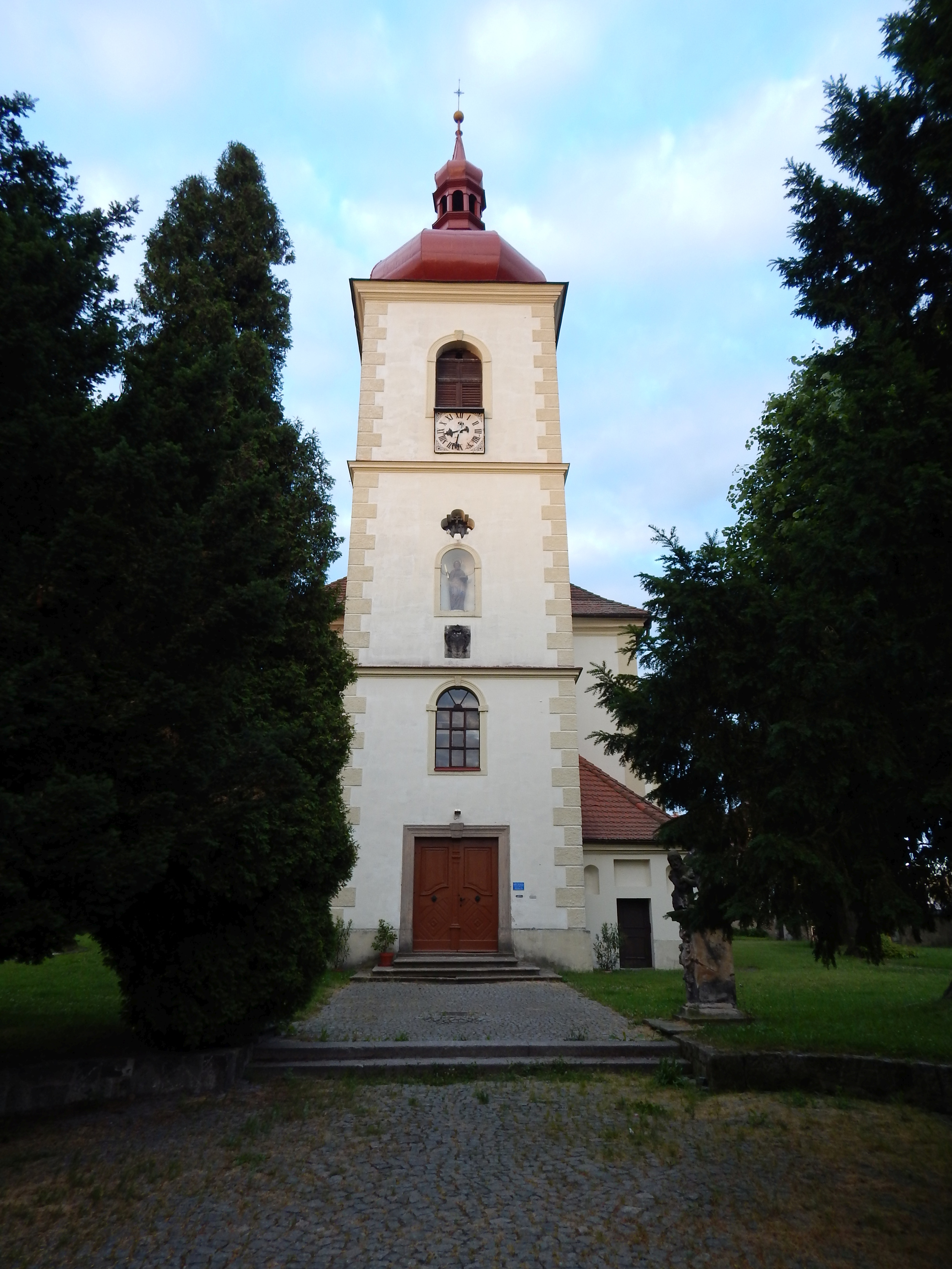 Kostel sv. Bartoloměje v Hrádku nad Nisou.